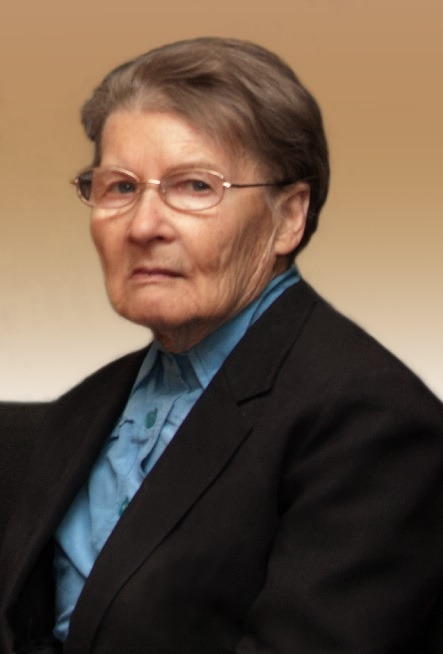 Портрет проф. Т.А. Седовой